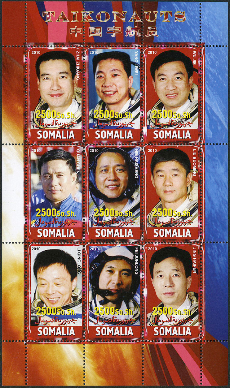 Taikonauts